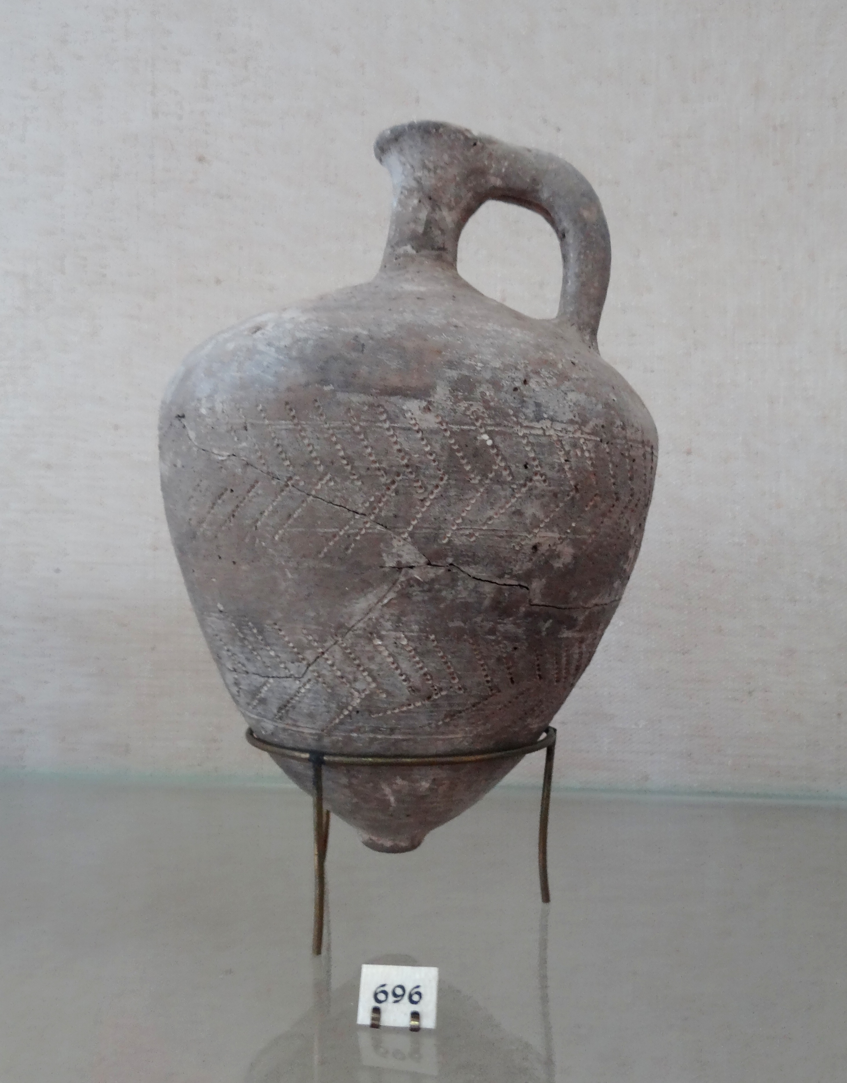 Tell el-Yehudiyeh ware Juglet.. Rockefeller Museum כלי תל אל יהודיה הינה קבוצת כלי קרמיקה ייחודית מתקופת הברונזה התיכונה II מוזיאון רוקפלר פכיות